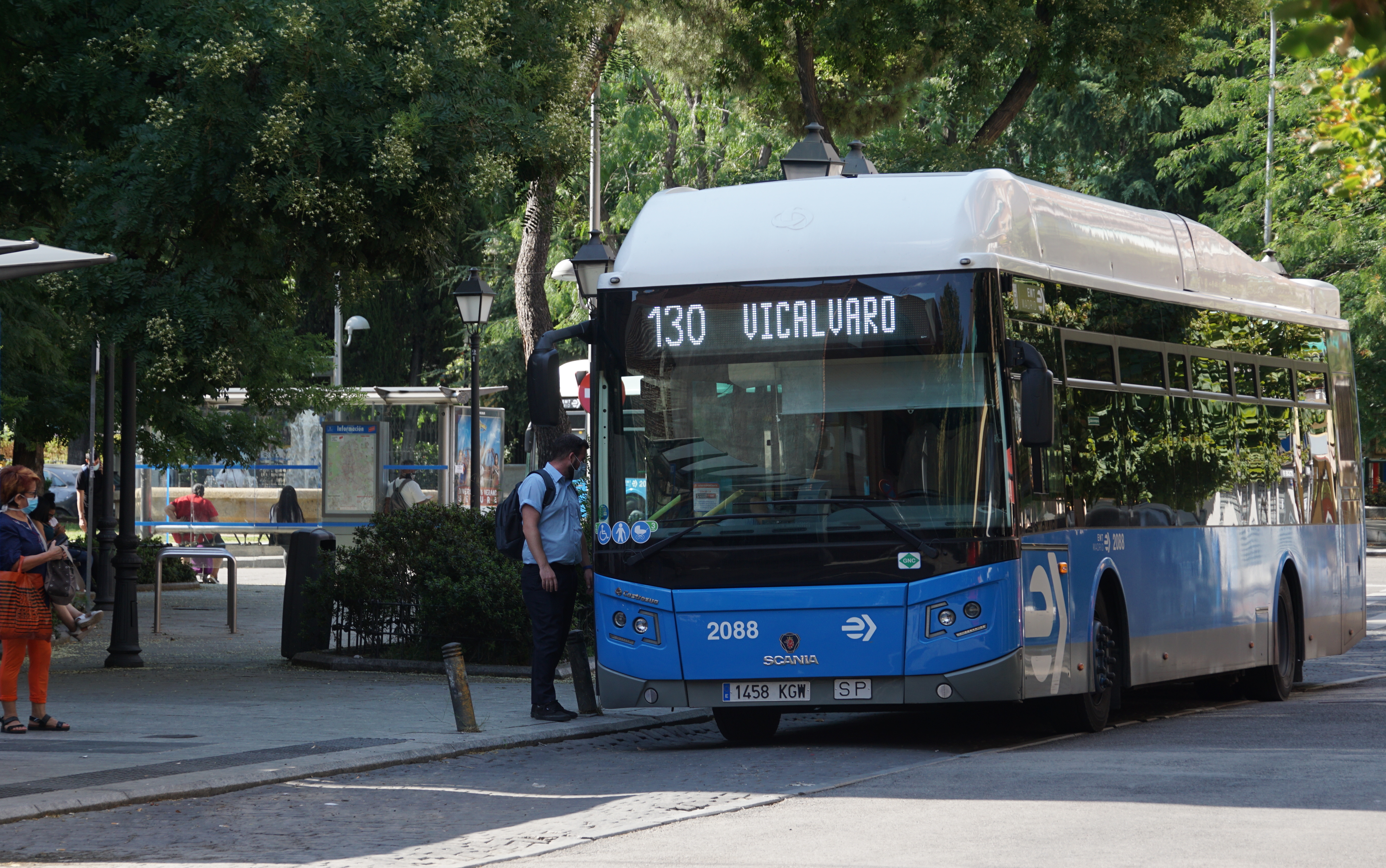 Final línea 130 en la Pl. Agata en Villaverde Alto, agosto 2020